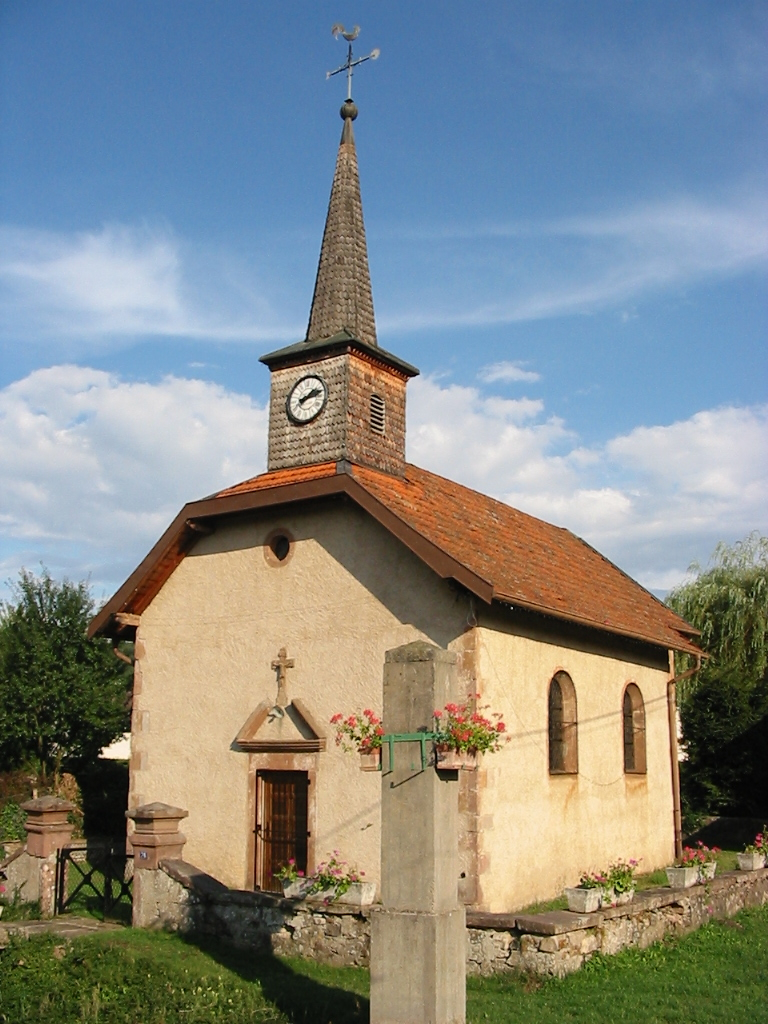 Raves La chapelle Saint-Étienne Commune des Vosges Canton de Saint-Dié-des-Vosges-Est Photo personnelle du 3 août 2006. Copyright © Christian Amet